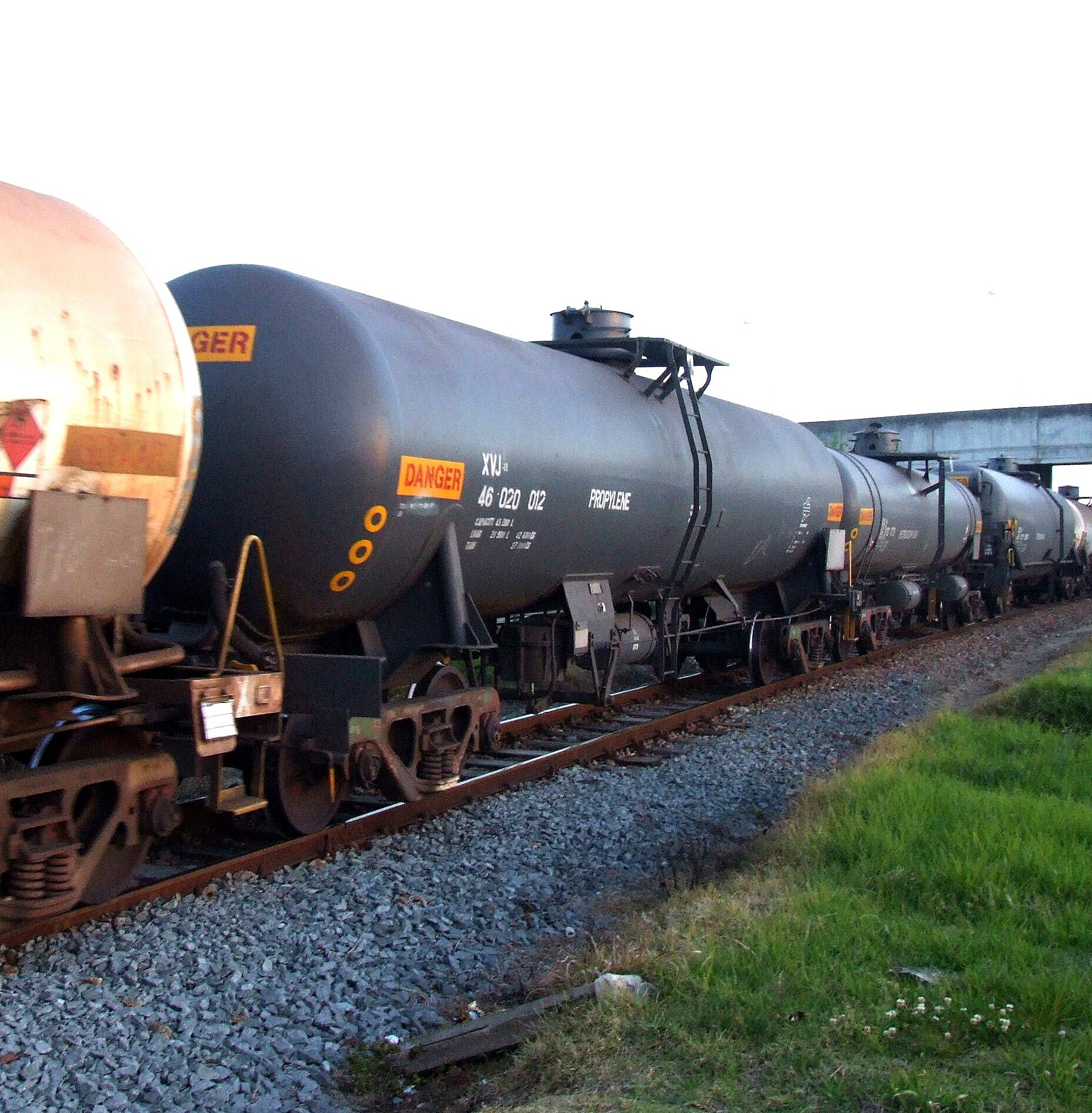 XVJ-12 Propylene